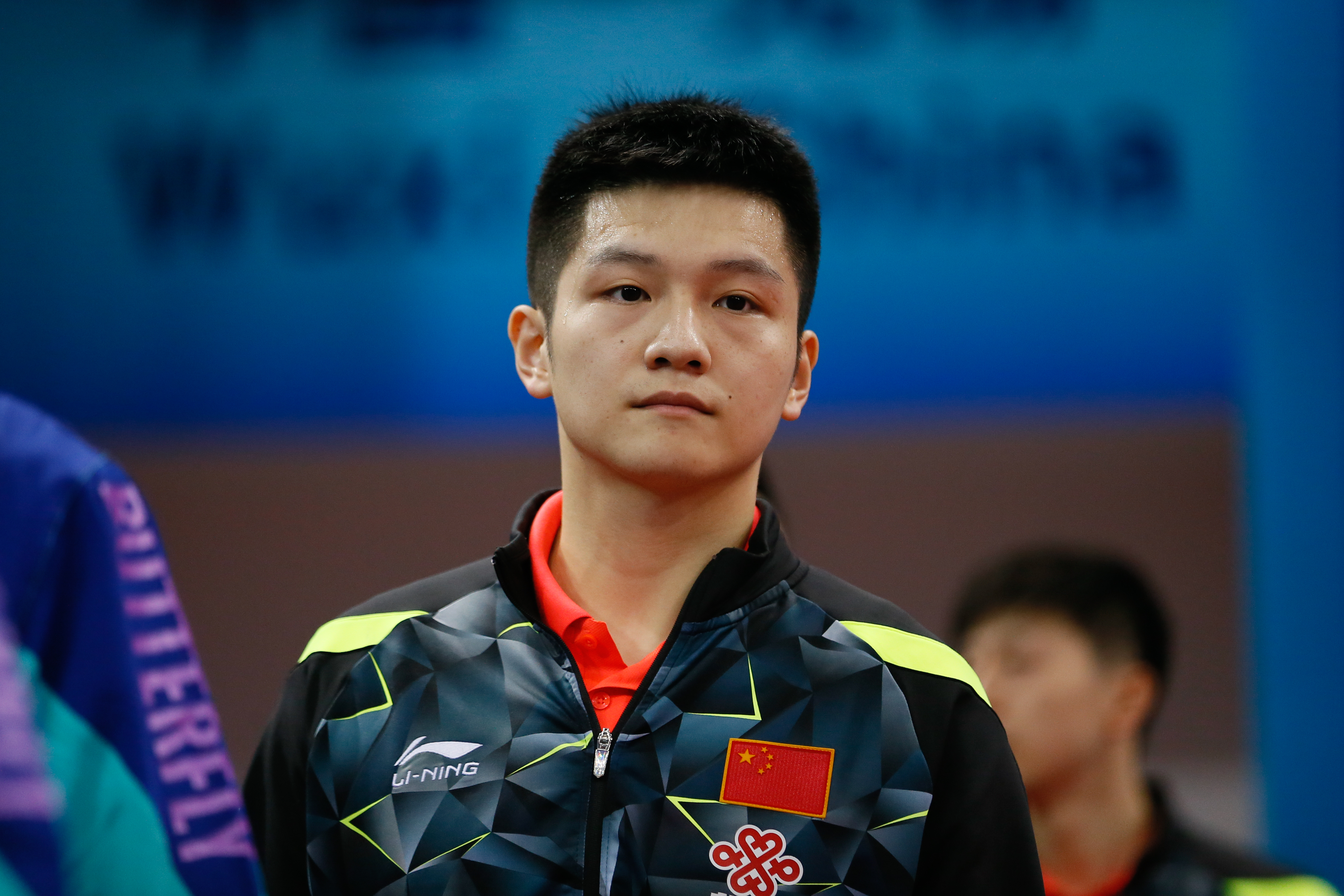 _K0K3265